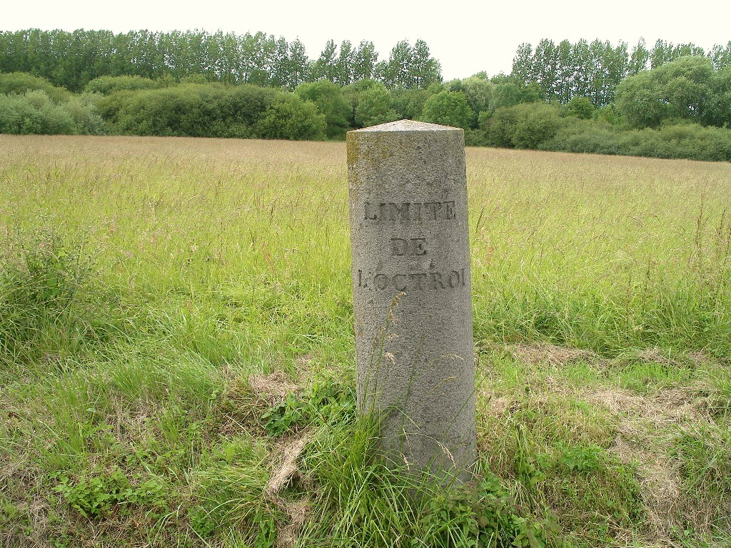 Borne limite de l'octroi (19ème) sur la route de Louvigny à Caen (Calvados)